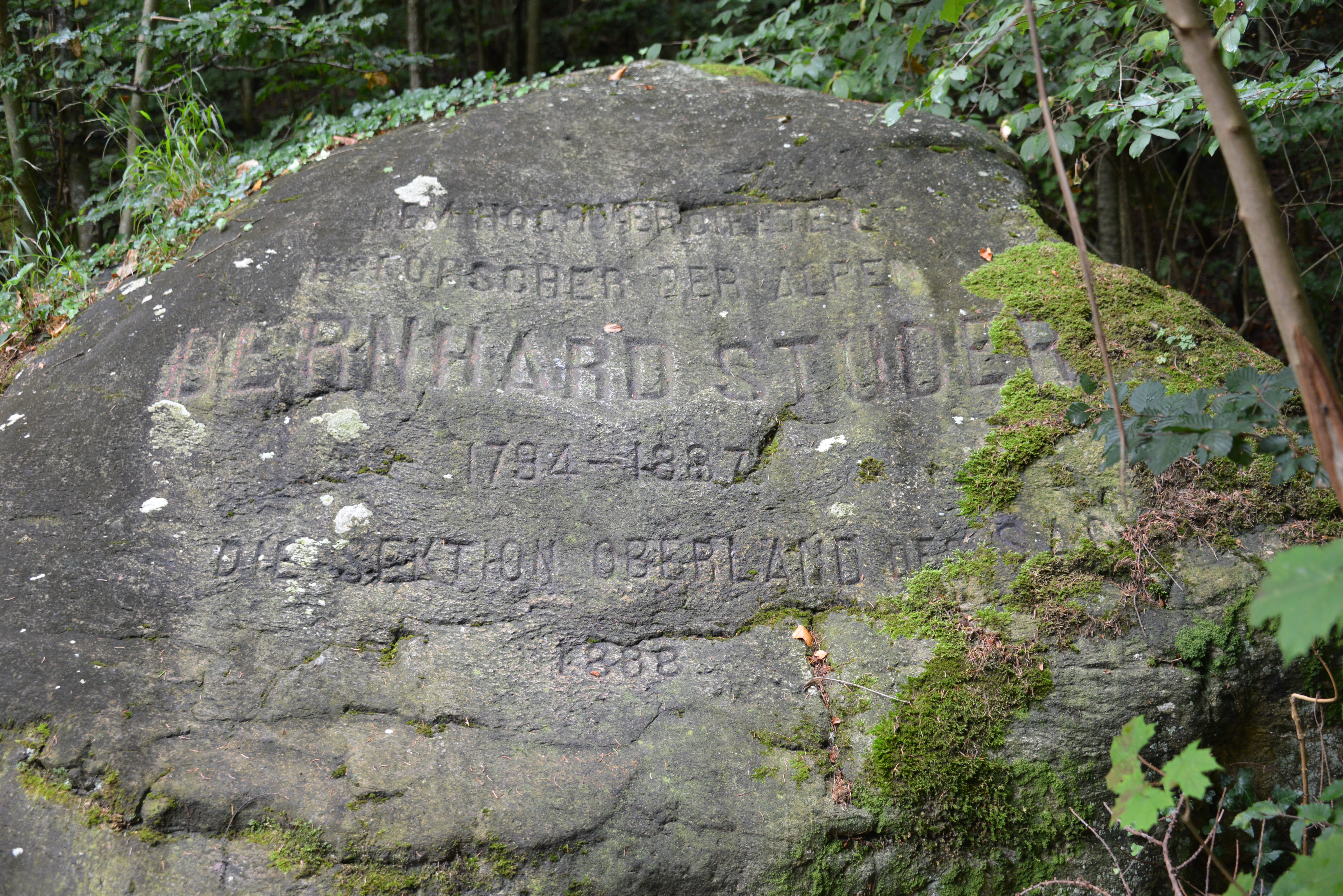 Bernhard Studer Swiss geologist